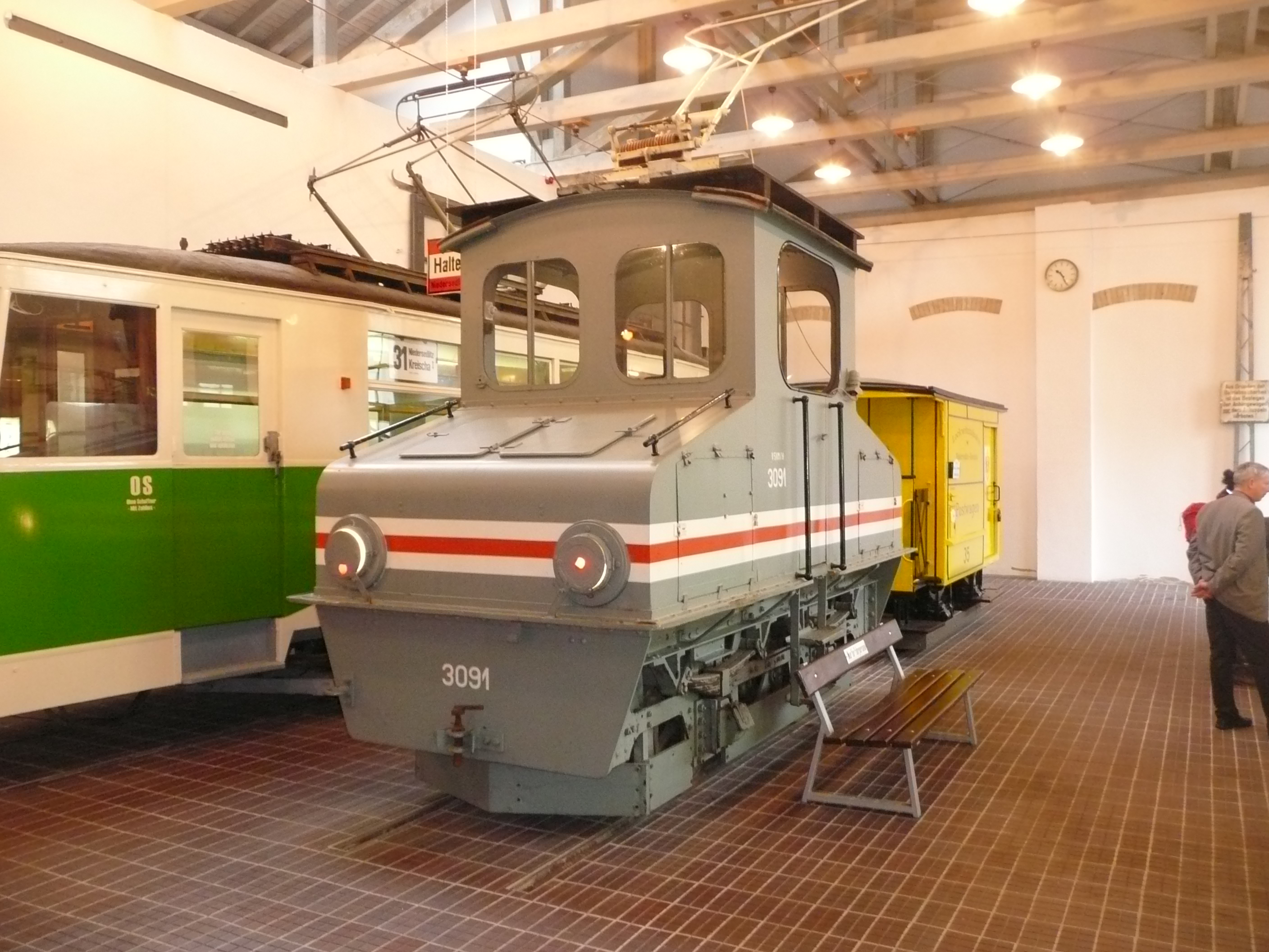 Güterlokomotive Straßenbahn Deuben Straßenbahnmuseum Dresden